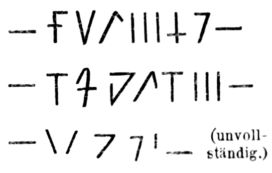 Inschrift auf dem Mittelstein des Steinkreises im Eselstall bei Quedlinburg